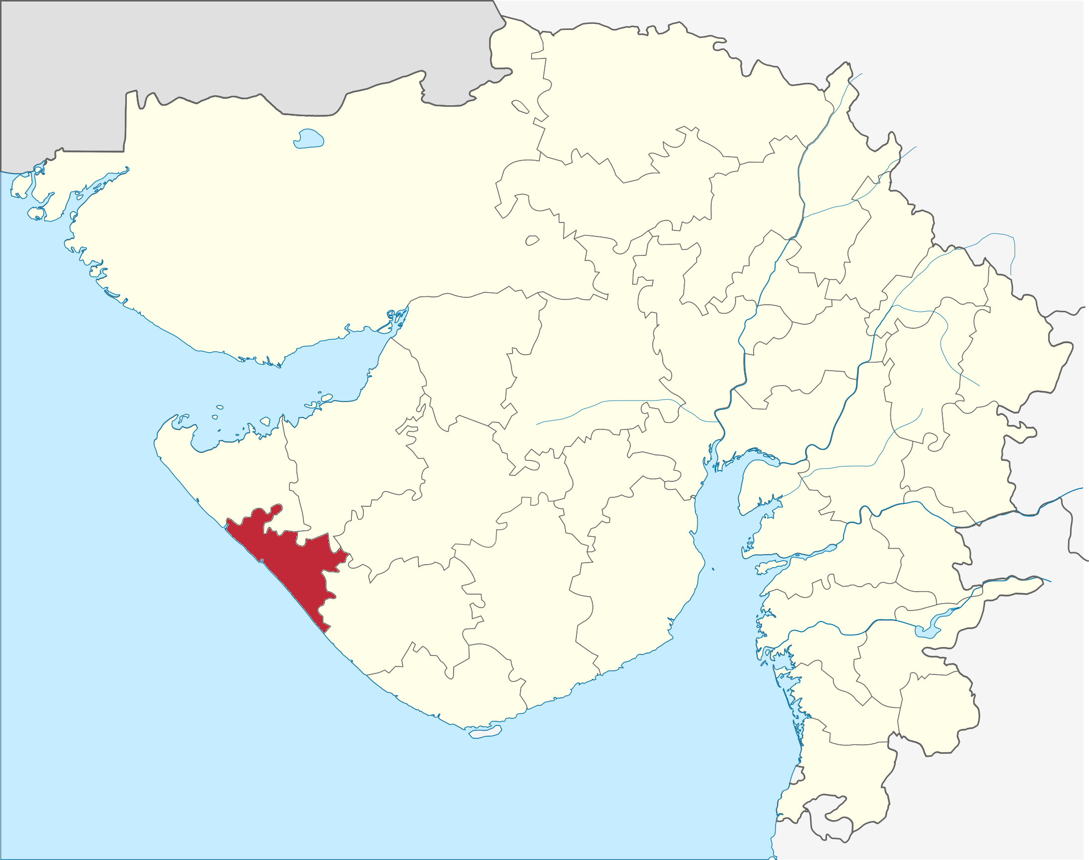 Distrito de Porbandar en Gujarat